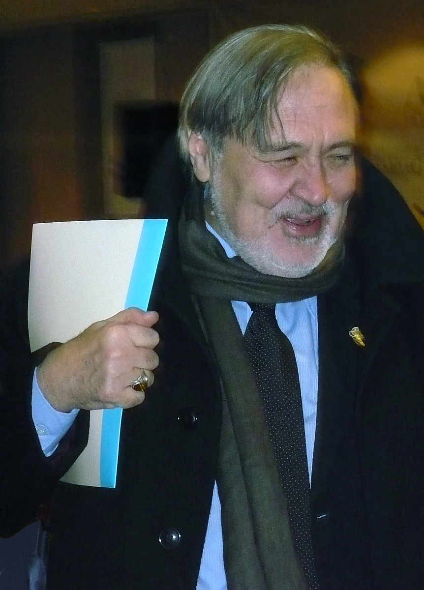 Prof.Dr. İlber Ortaylı